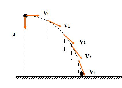 这是曲线运动的一种，即平抛运动。物体的运动轨迹是一条抛物线。